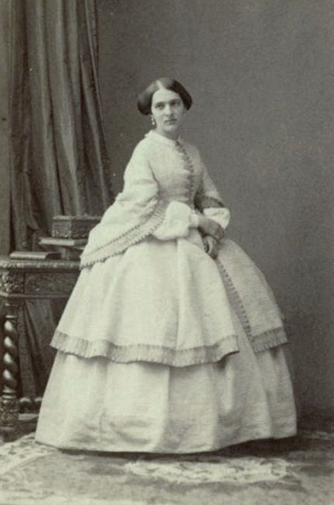 Ольга Эсперовна Шувалова, ур. Белосельская-Белозельская (1838-1869)